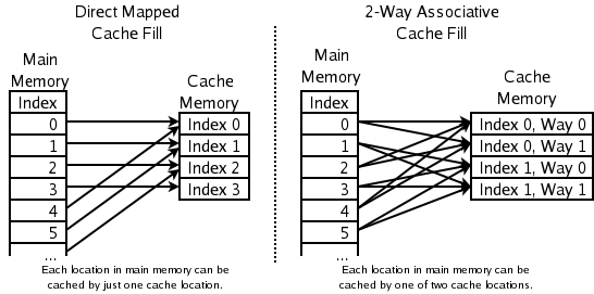 Differenti metodi di riempimento della cache (direct mapped e 3-way set associative) Immagine presa dalla Wiki inglese, altre info su Image:Cache,associative-fill-both.pnghhhhh